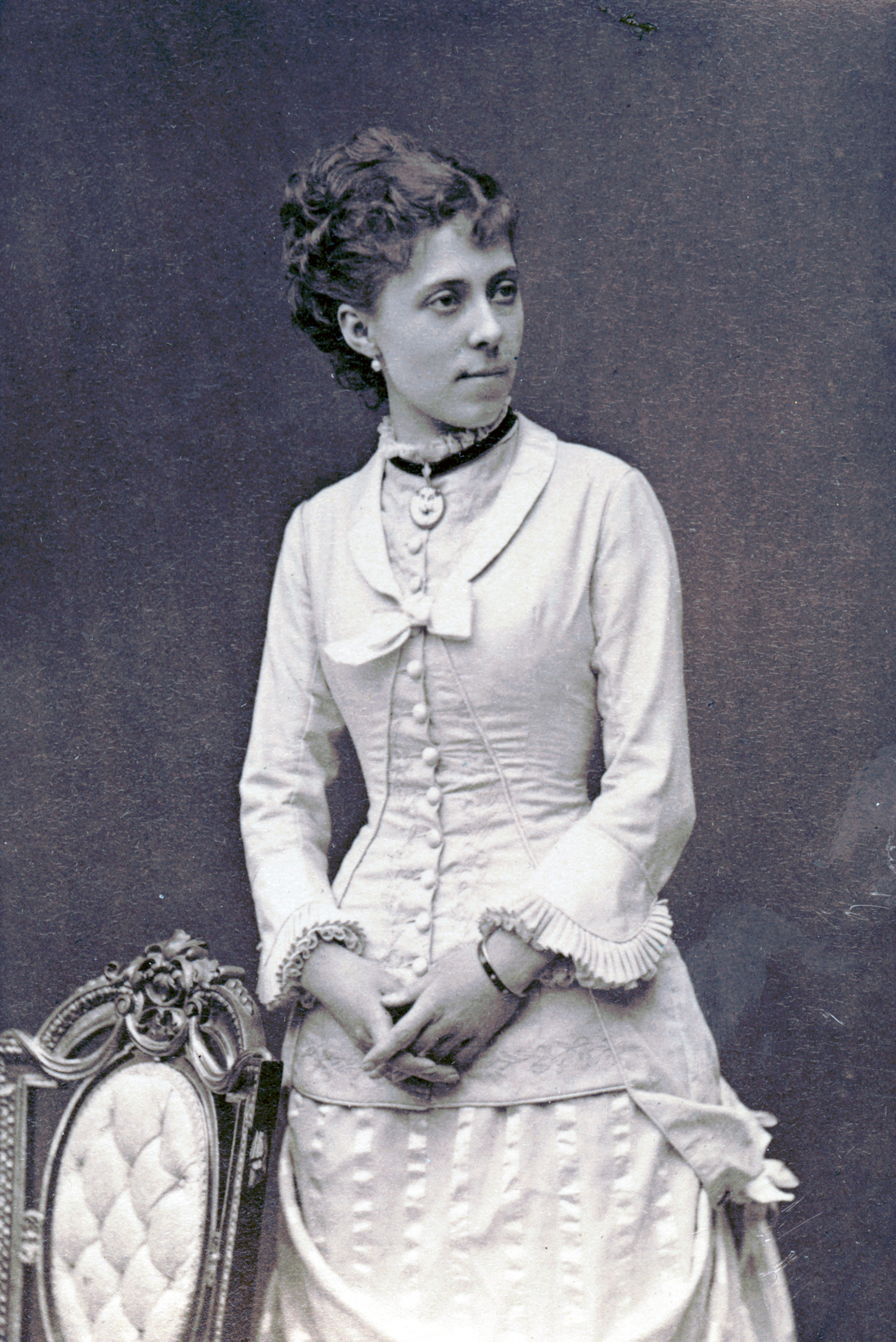 Georgina Bäckström, skådespelare vid Kungliga Dramatiska teatern 1872